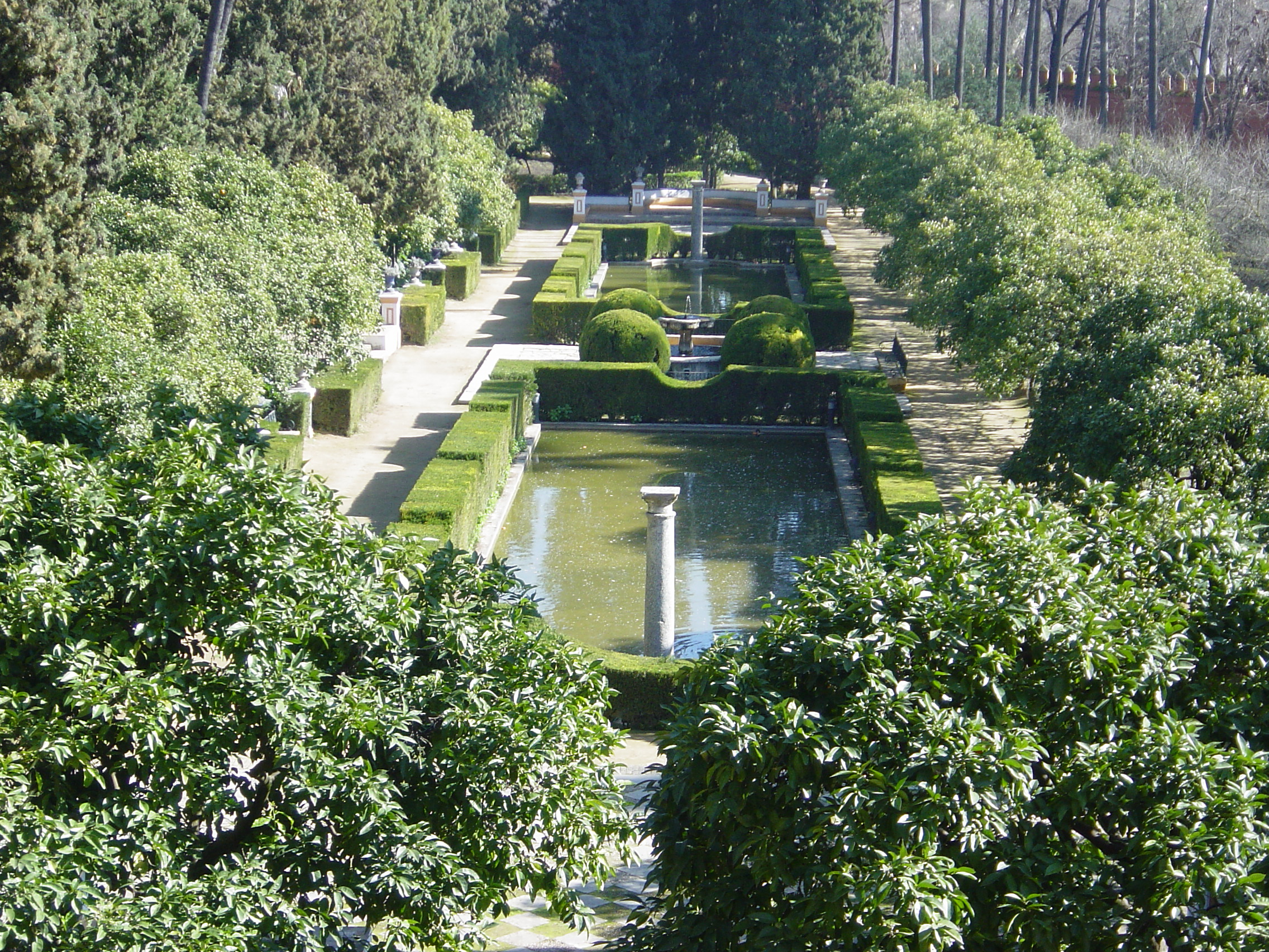 アルカサル、セビーリャ、スペイン